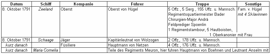 Transport des württembergischen Kapregiments vom Kap der Guten Hoffnung nach Ceylon 1791